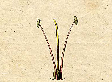 Ausschnitt (Klasse II) aus Ehrets Tafel "Methodus Plantarum Sexualis"